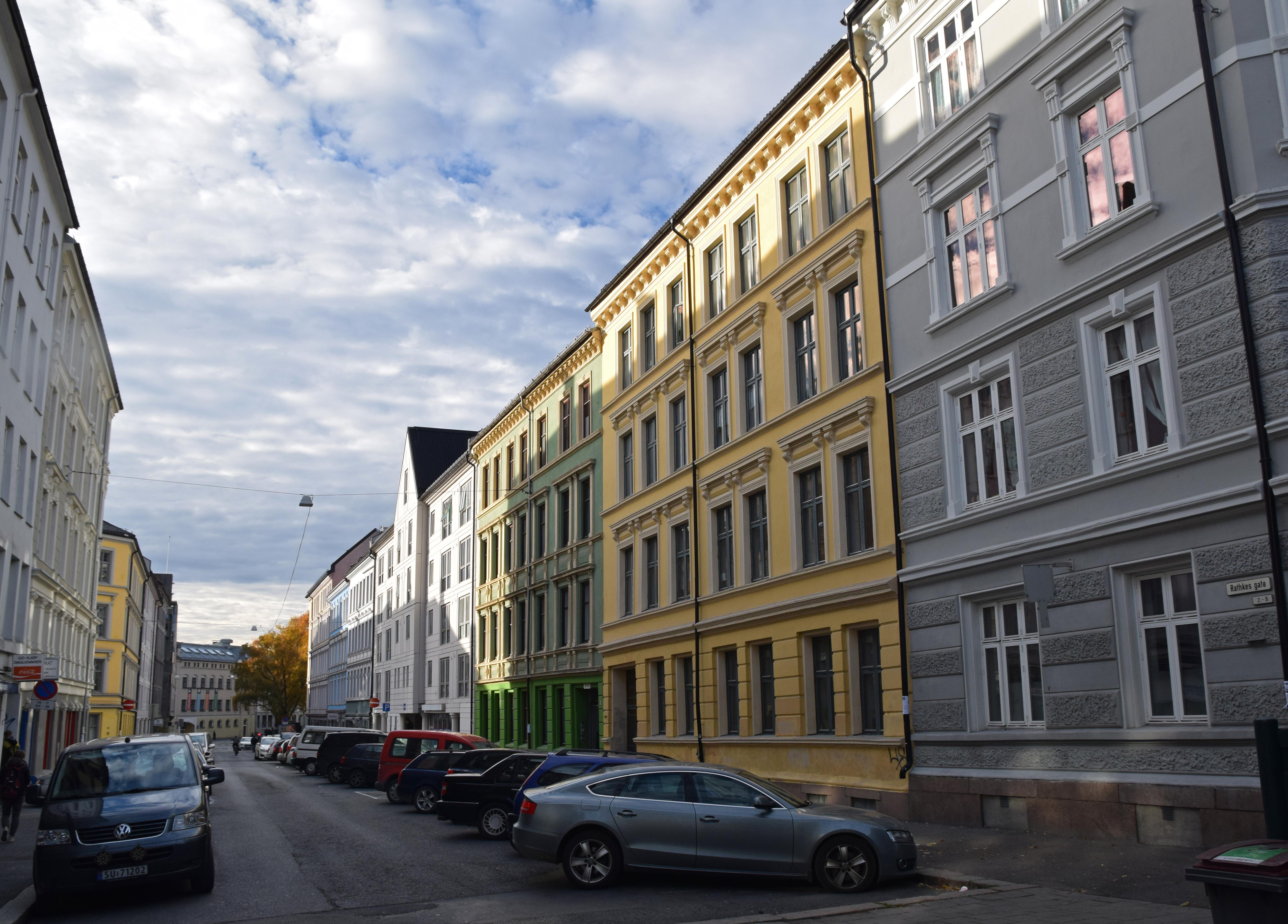 Rathkes gate sett fra Rathkes plass mot Schous plass, 30. oktober kl. 14.00, med skyggevirkning av fem etasjer (nærmest til venstre) og fire